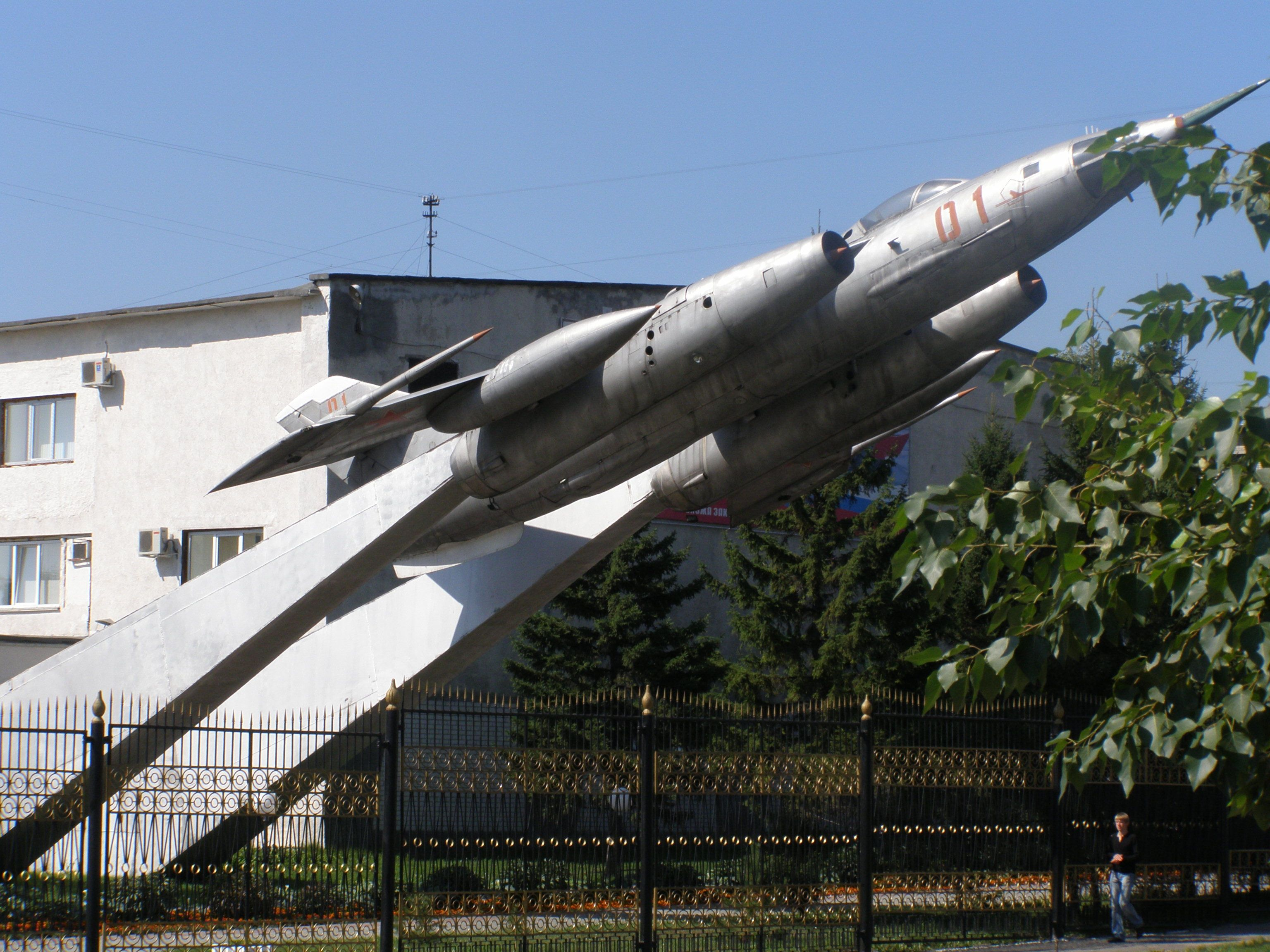 Як-28 возле БЮИ - бывшего здания летного училища